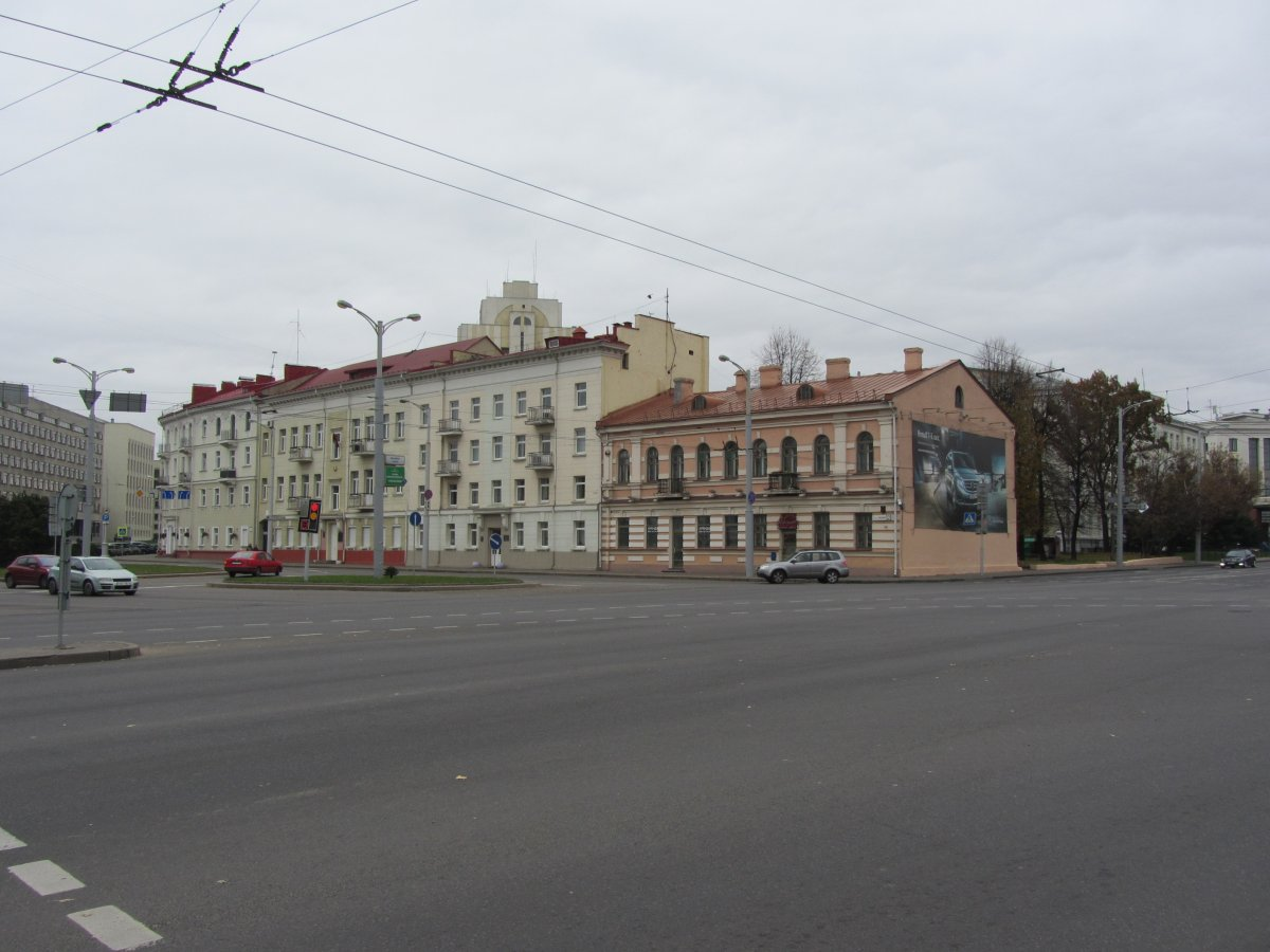 Мінск. Плошча Мяснікова. Забудова вул. Савецкай